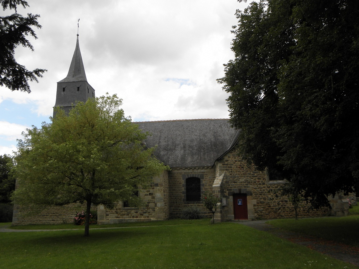 Vue méridionale de l'église Saint-Lubin de Longaulnay (35).